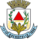 Brasão_Buenópolis_MG.gif